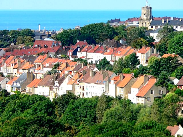 Vue de Boulogne-sur-Mer (Pas-de-Calais, France) : le quartier de Brecquerecque, le beffroi, le phare et la mer.